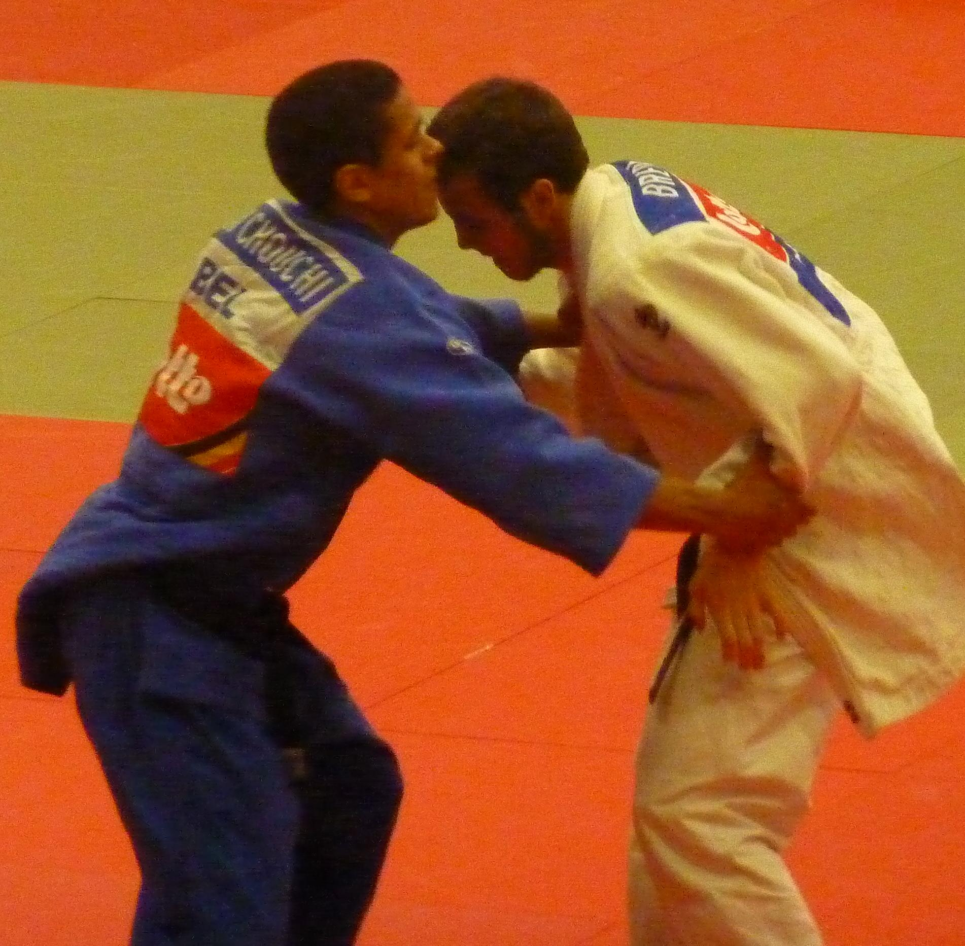 Sami Chouchi au championnat de Belgique à Herstal le 25 février 2012.